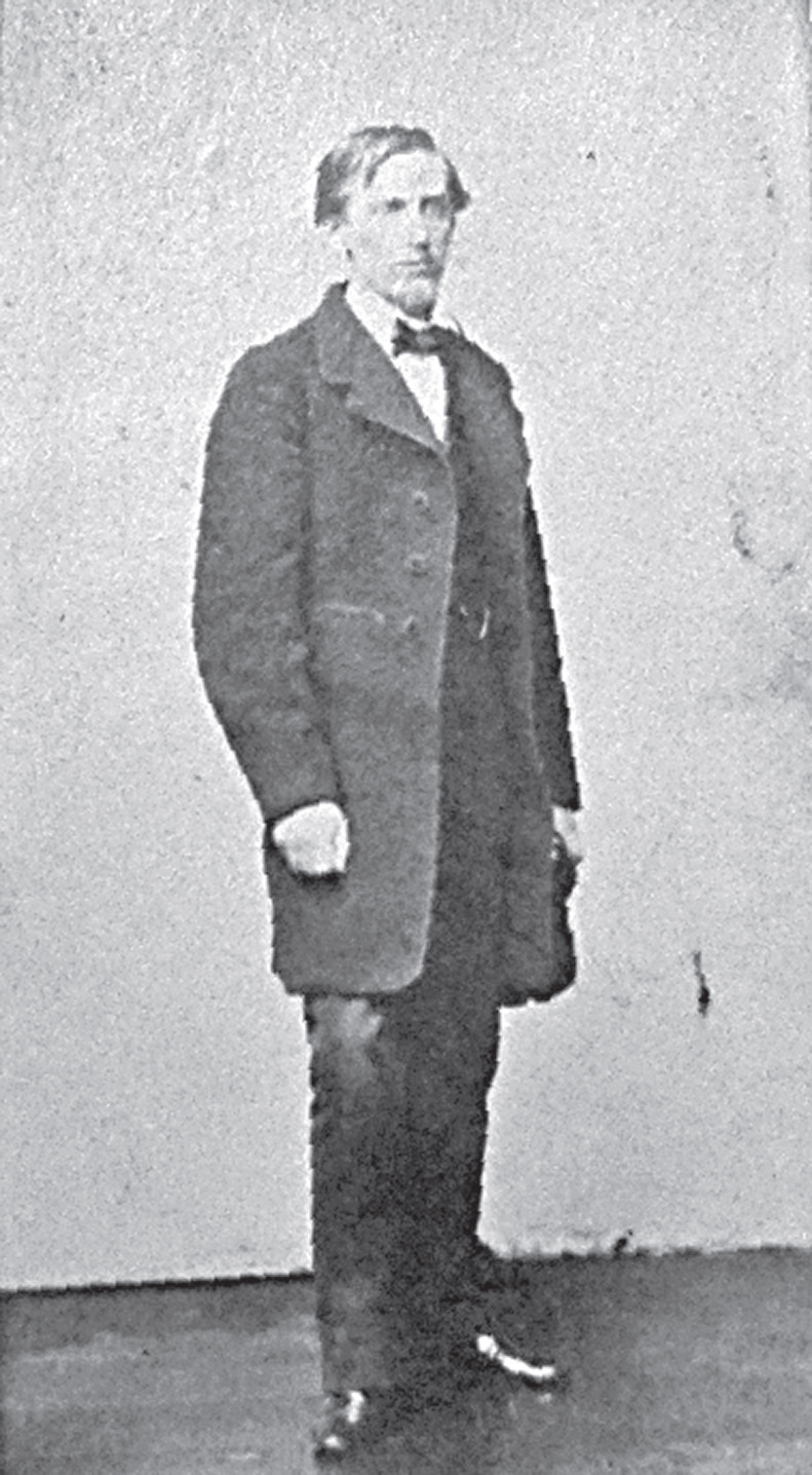 Беларуская (тарашкевіца): Партрэт Адама Ваньковіча (Adam Vańkovič)